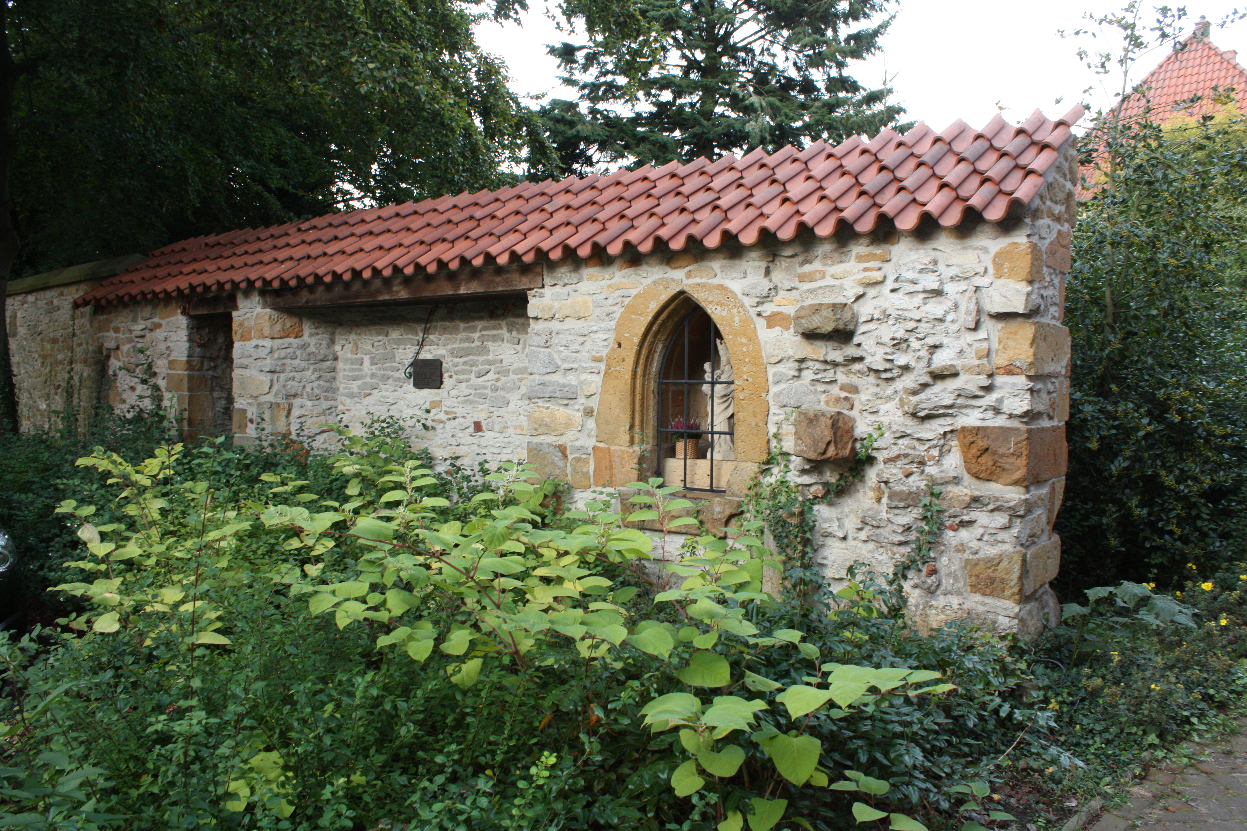 Restmauer der ehem. Wadenhart-Kapelle in Marienfeld Nr. 3 der Denkmalliste von Harsewinkel